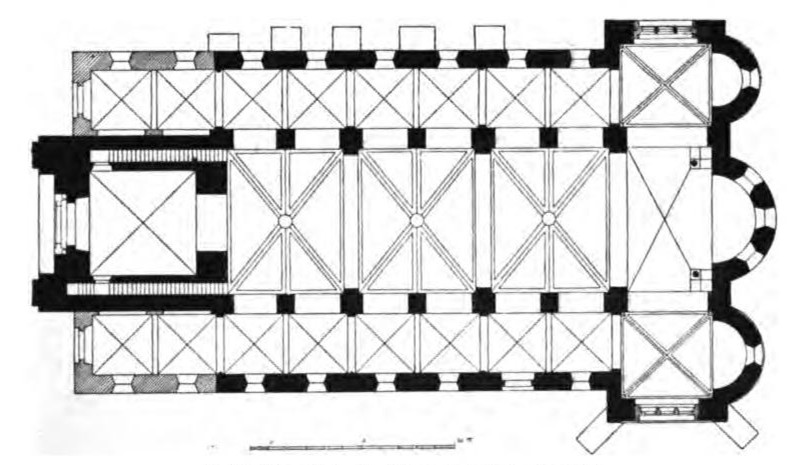 Sankt Nikolaus (Wipperfürth)